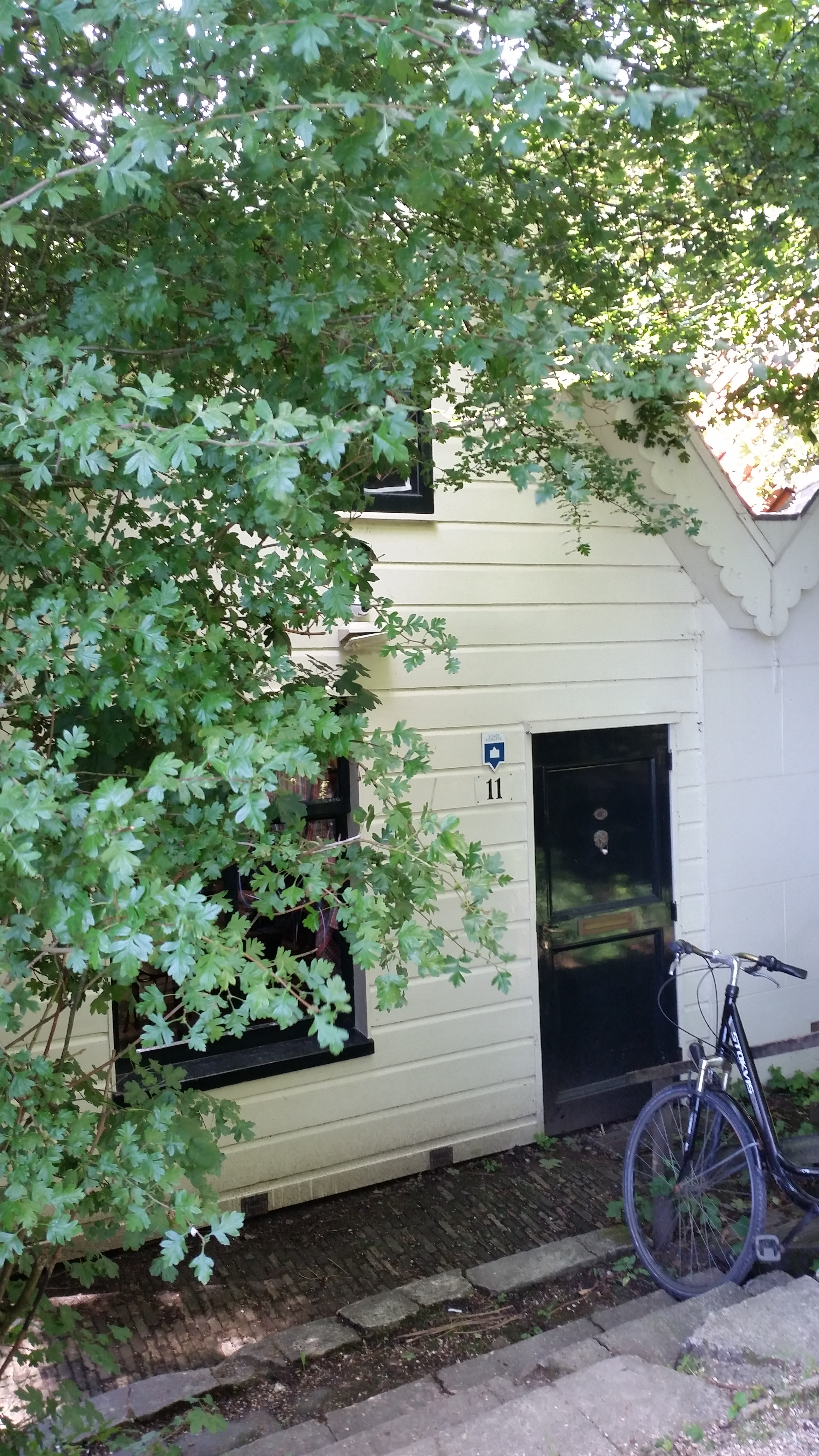 Impressie van Flevopak 11-12, Amsterdam